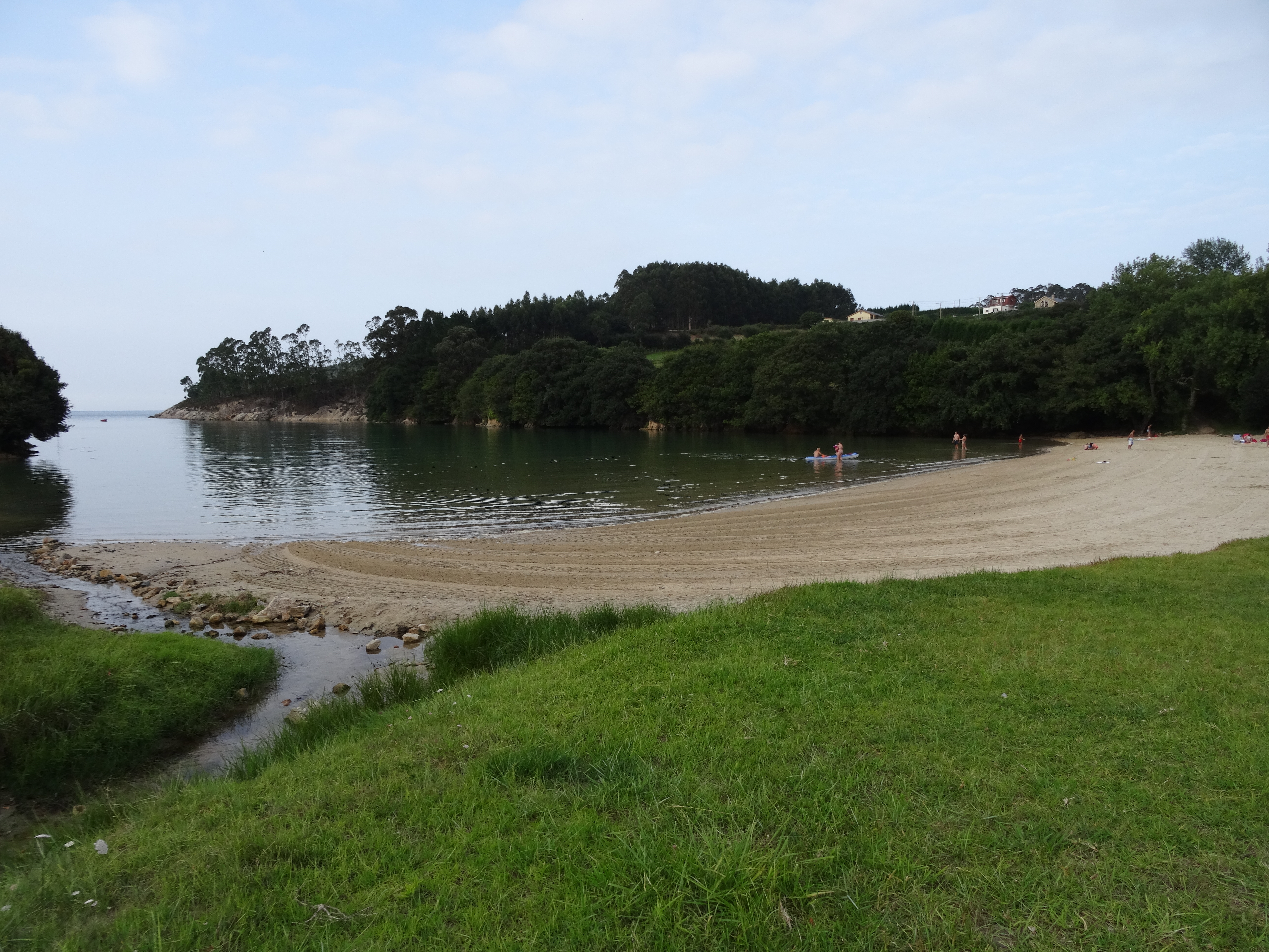 Ver nome.